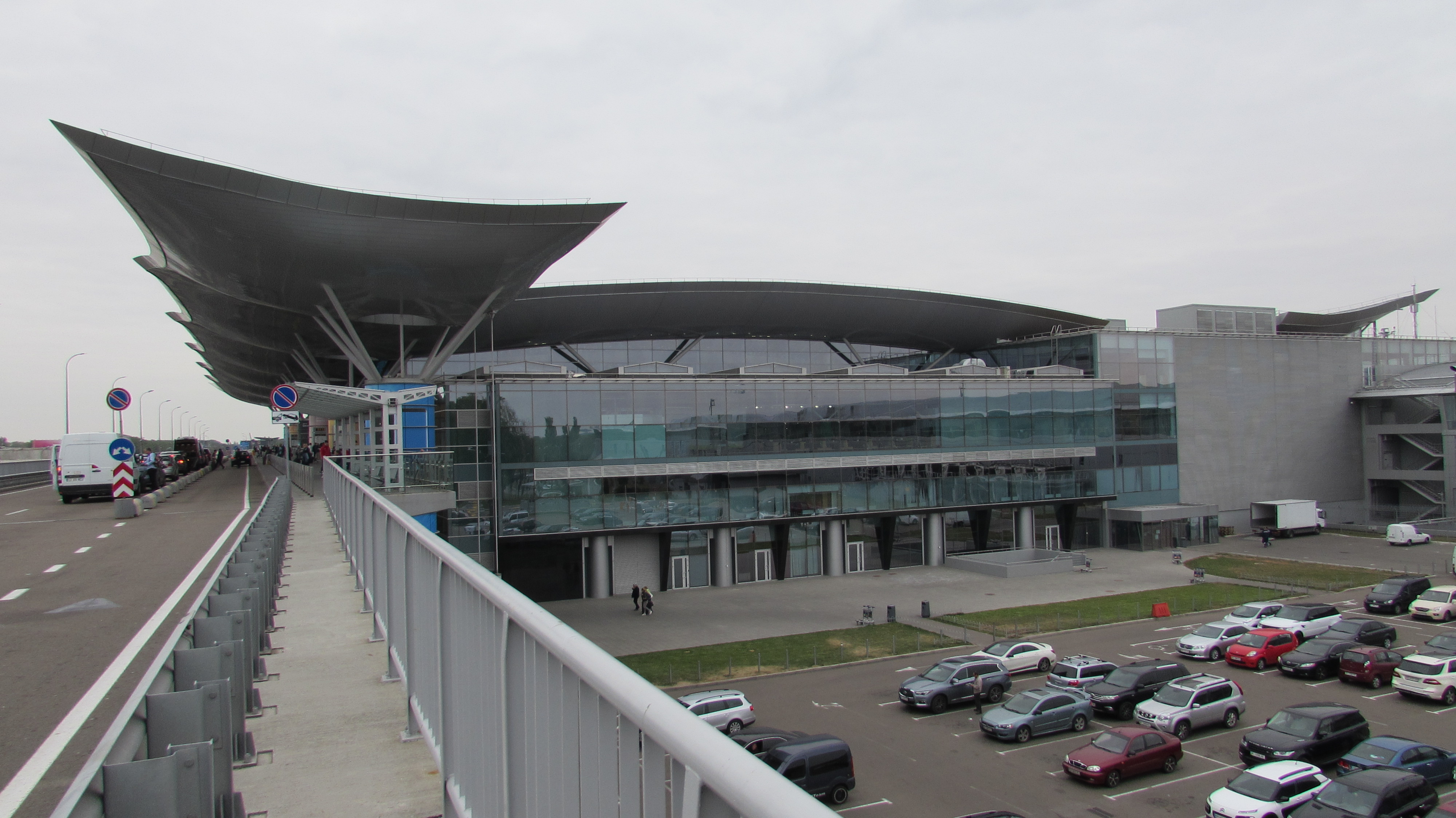 Kiew Flughafen Boryspil Ansicht 2017